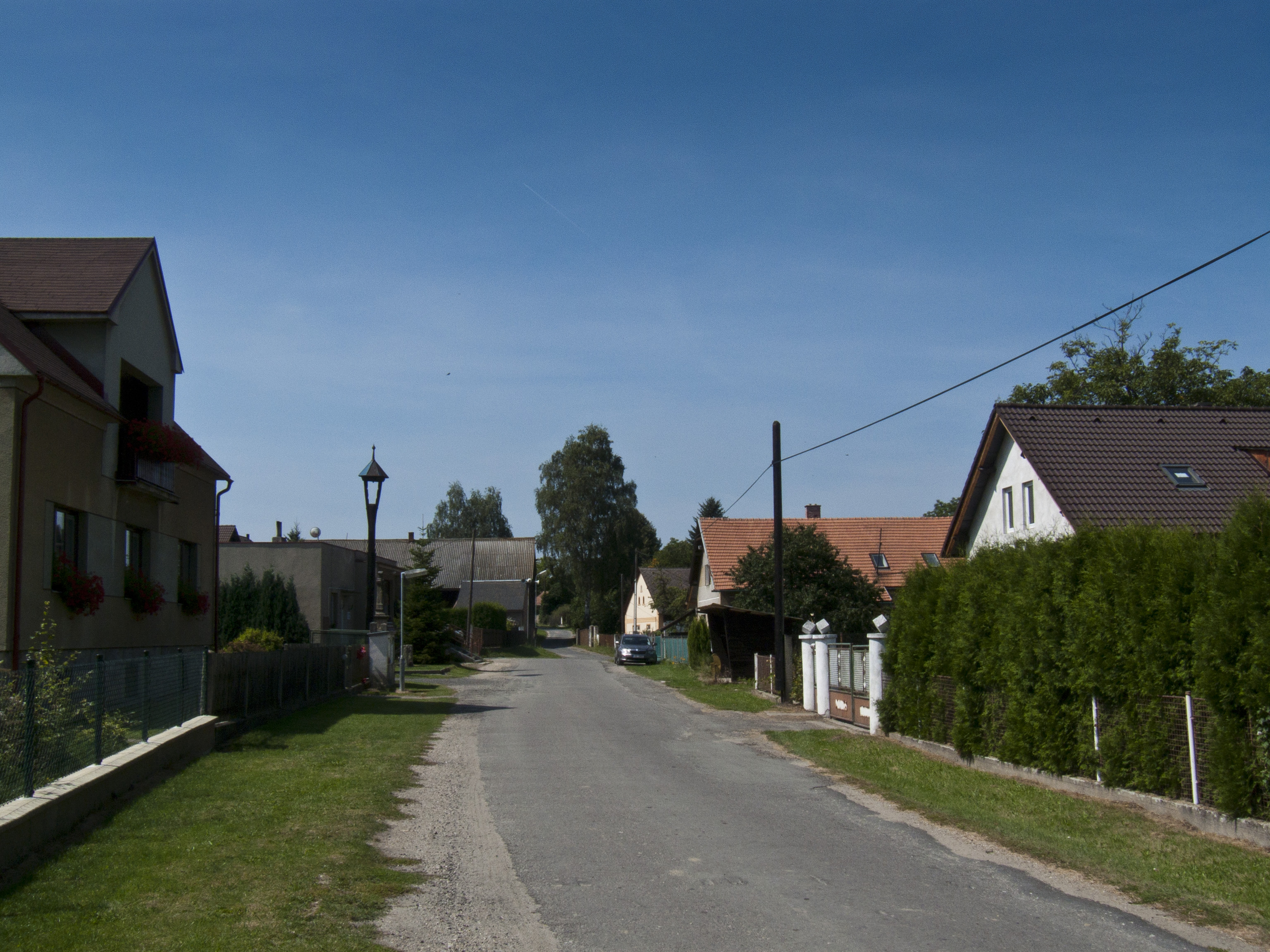 Lhotky (okres Mladá Boleslav)